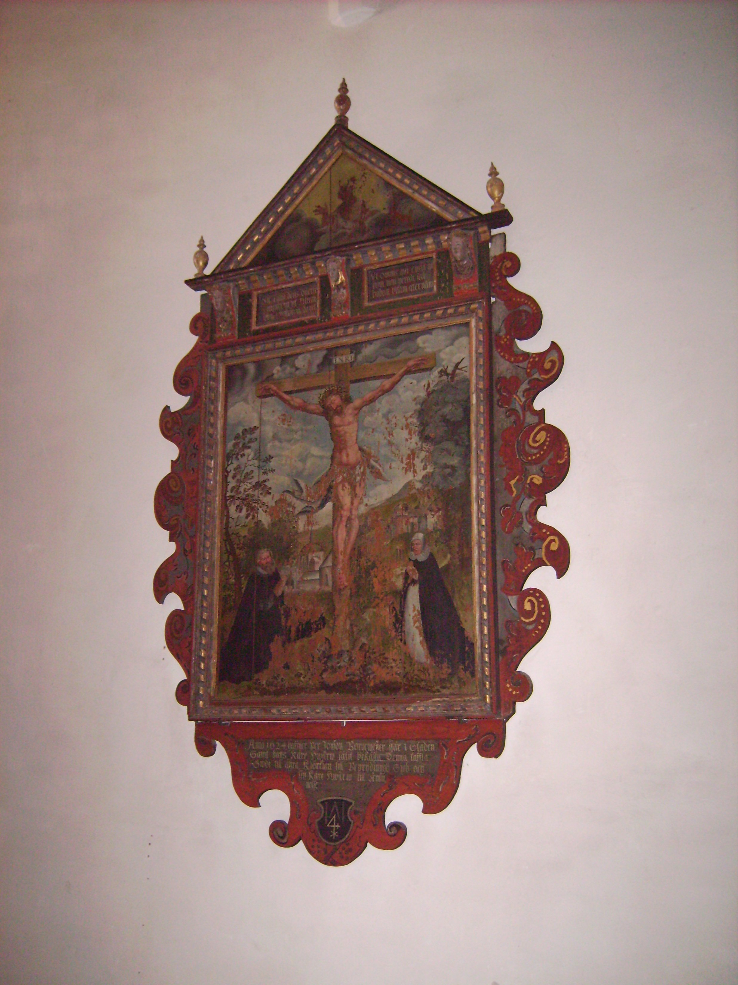 The Middle Age church ”Vårfrukyrkan” in Skänninge, built around 1300 by the German population in the town. "Anno 1624 hafwer Per Jönsson, borgemester här i Staden samt hans käre hustru låtit bekåsta denna taffla, Gudi till ähra, Kiörkian till beprydningh, Sigh och sin käre Hustru till åminnelse."